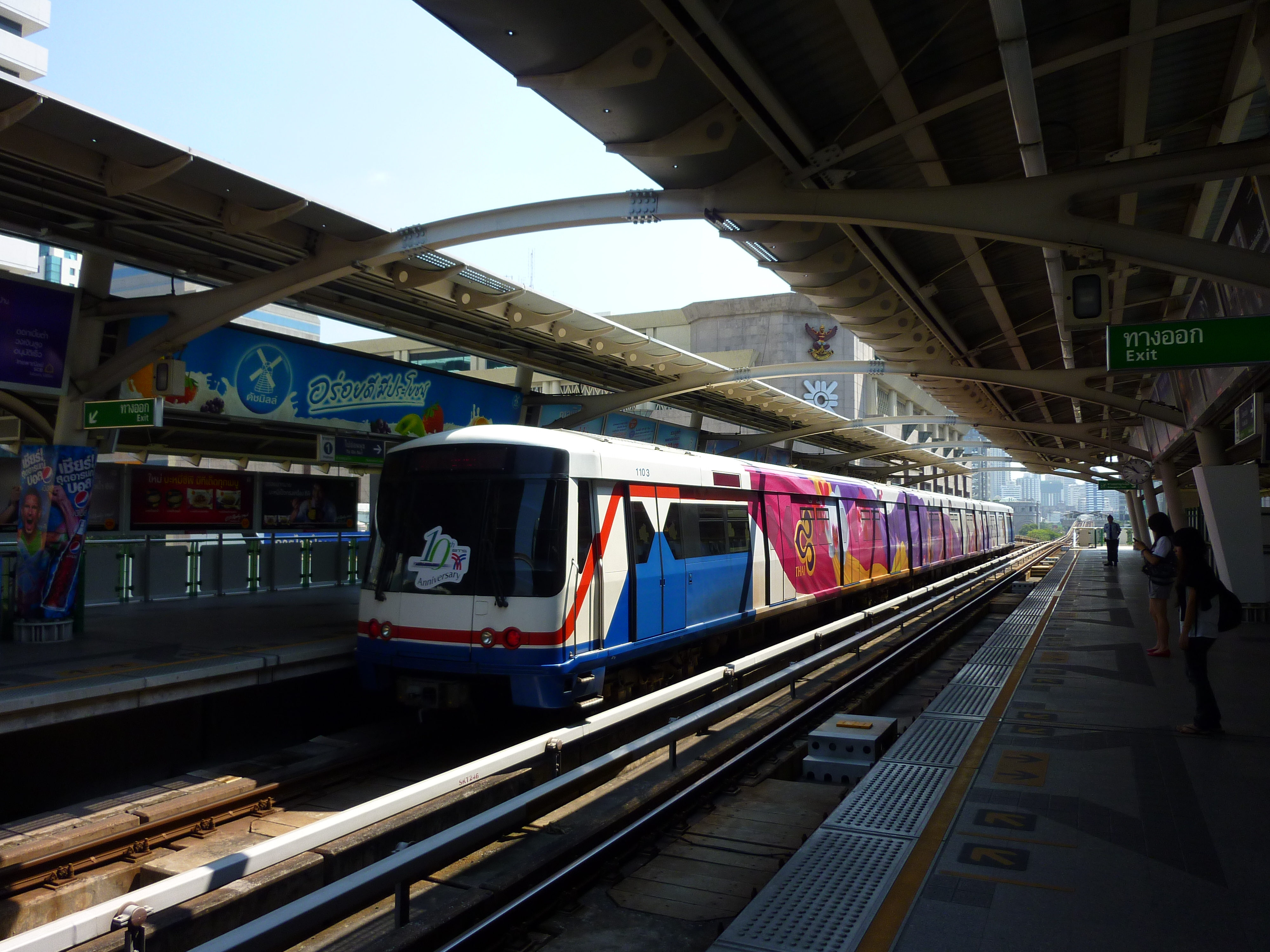 สถานีรถไฟฟ้า BTS สถานีชิดลม